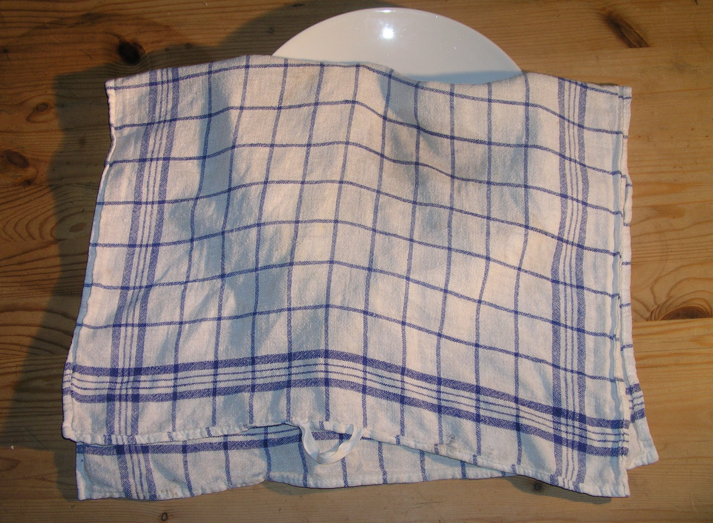 Viskestykke